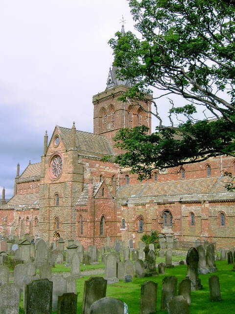 Magnusdom in Kirkwall, Mainland, Orkneyinseln